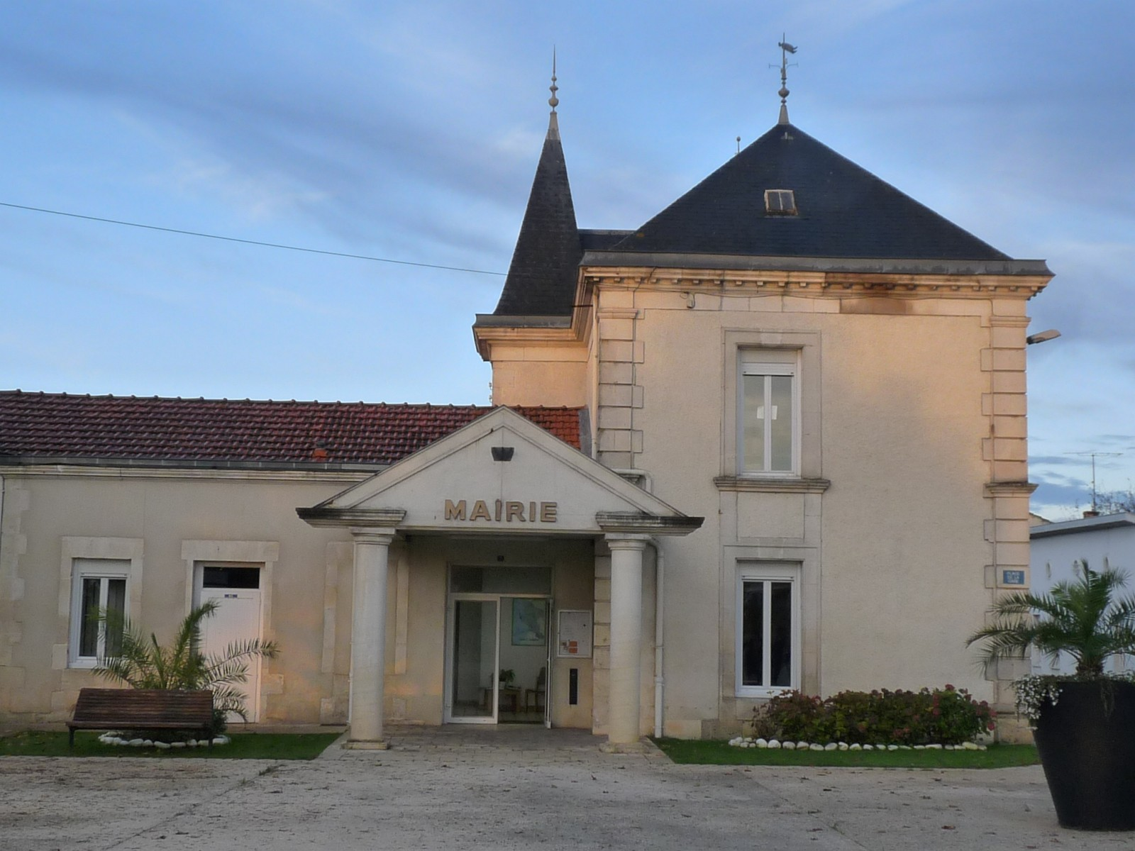 Mairie de Bussac-Forêt, Charente-Maritime, France